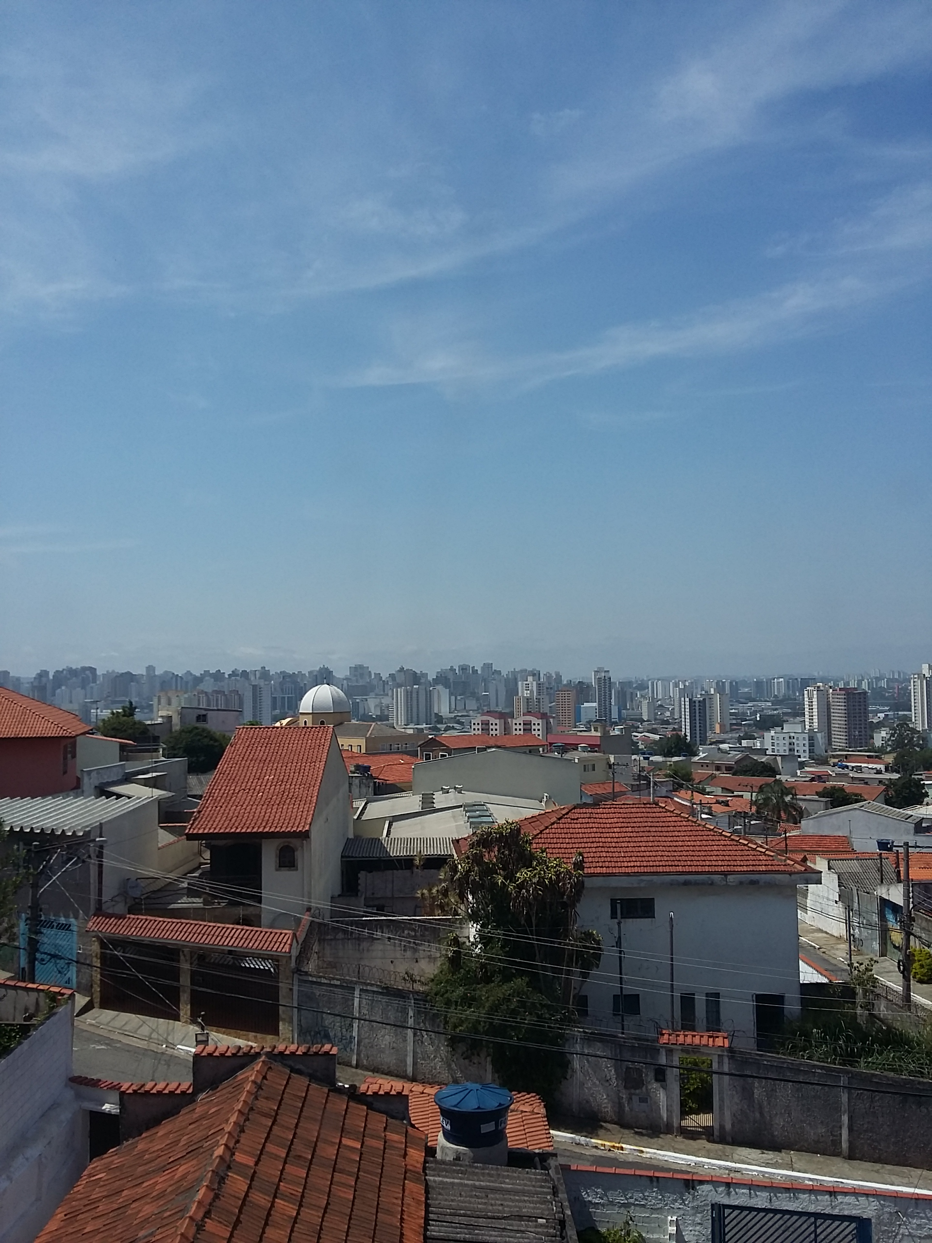 Vista da Vila Bela com a cidade de São Caetano do Sul ao fundo.